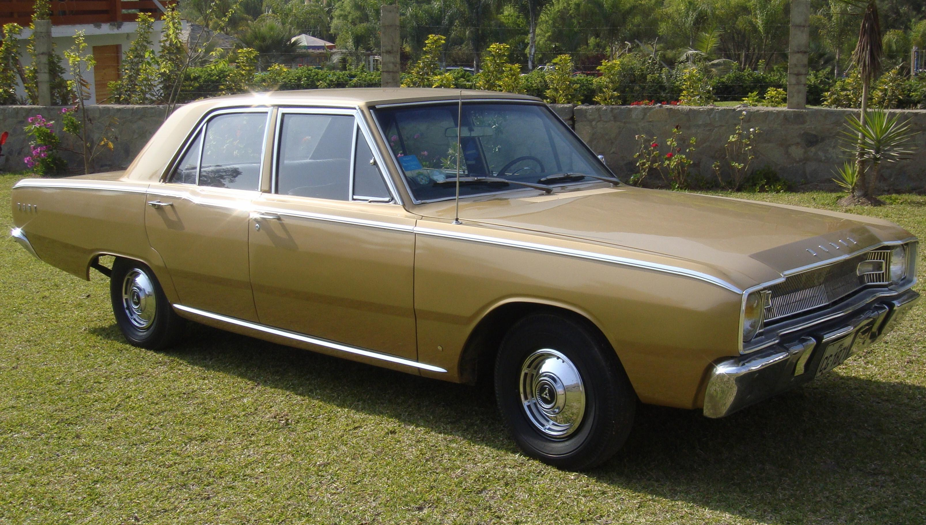 Es un Dodge Dart 1967, auto que sirvió de modelo para desarrollar el diseño de los Dodge argentinos a partir de 1968.